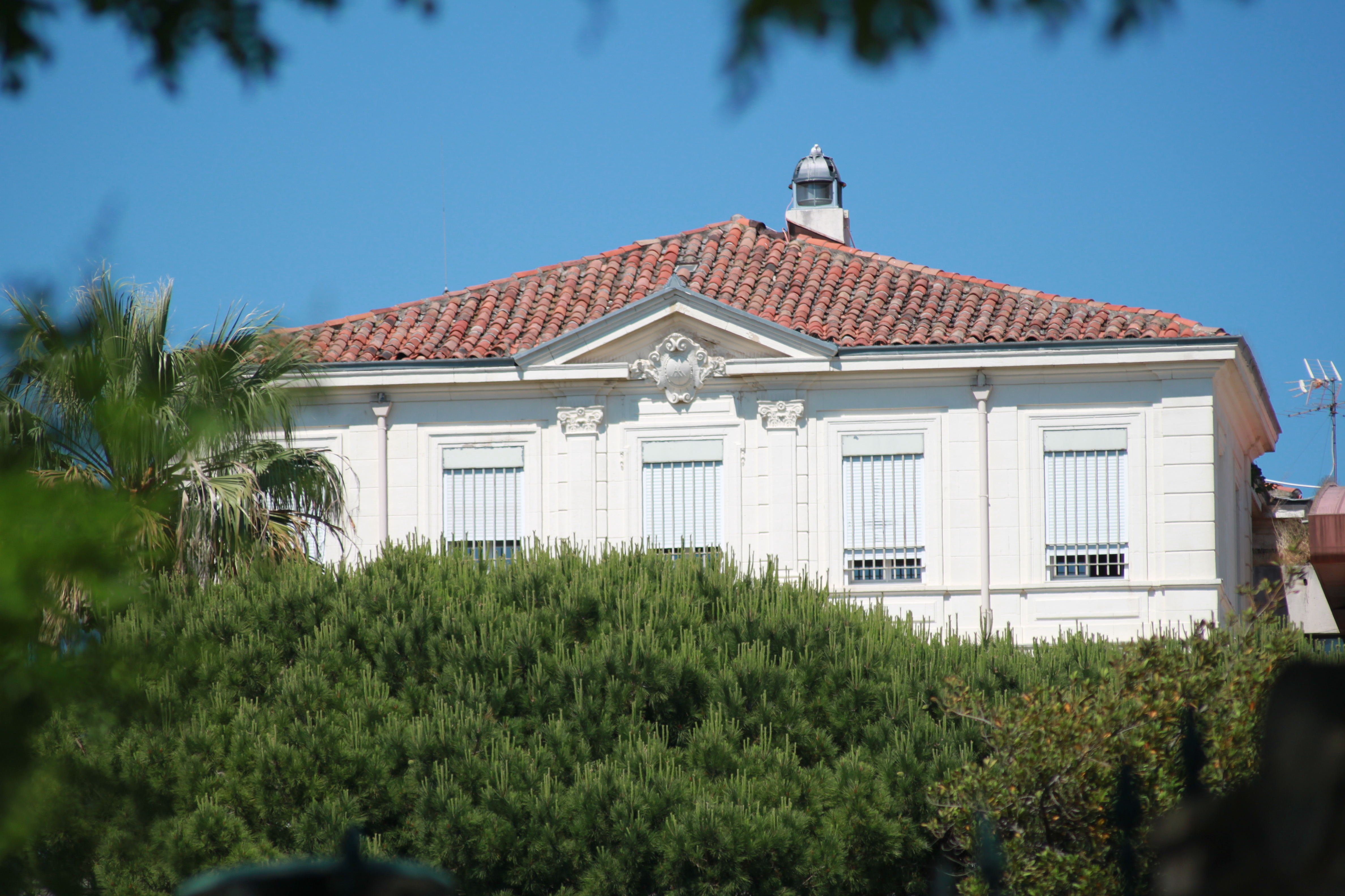 chateau de bonneveine, marseille